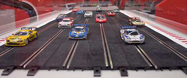 Ninco JGTC-Fahrzeuge auf der Spielwarenmesse 2005